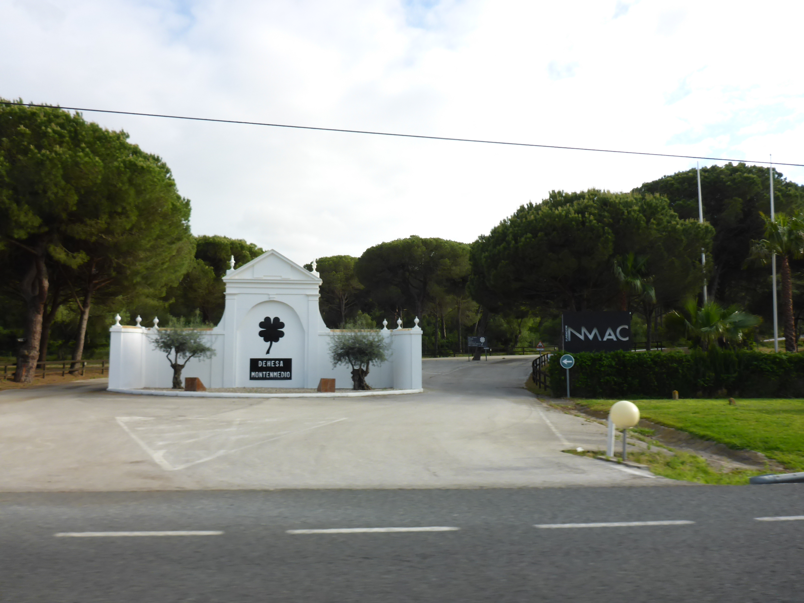 Dehesa Montenmedio - Vejer de la Frontera (Andalucía, España)